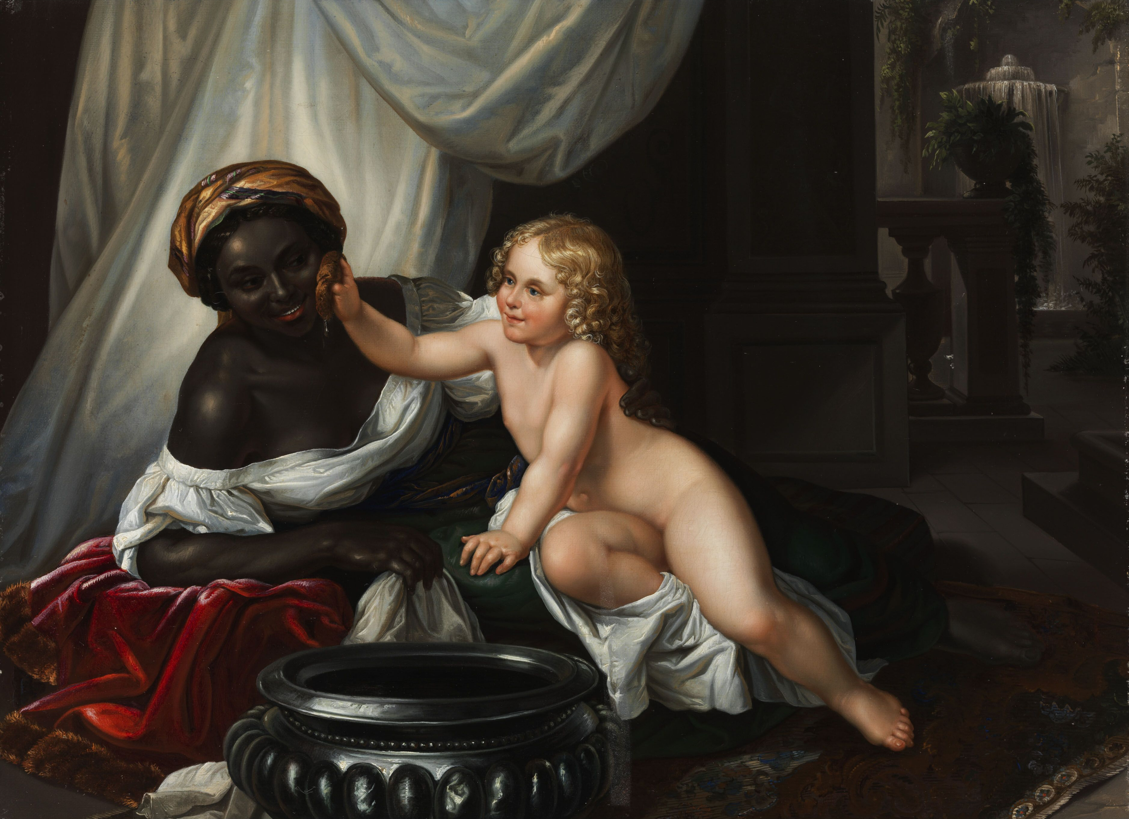 Kopie nach dem Gemälde von Carl Joseph Begas, Kreismuseum Heinsberg, womöglich eine Wiederholung des Künstlers oder eine Kopie von Oskar Begas